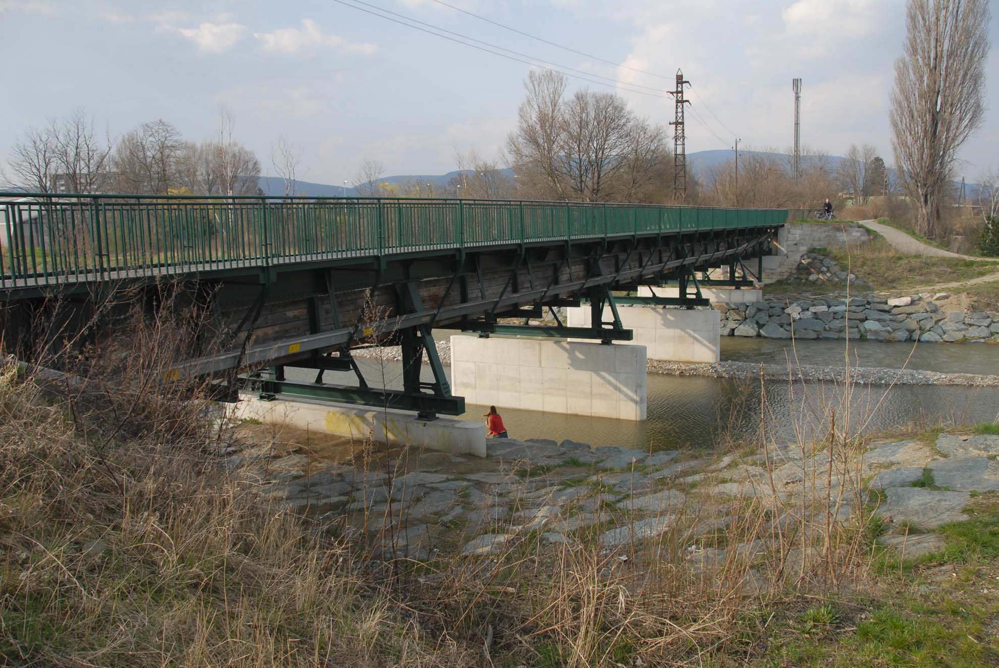 Das Aquädukt des Wiener Neustädter Kanals über die Schwechat in Tribuswinkel bei Baden. Das Wasser läuft in einem Holztrog, der auf einer Stahlträgerkonstruktion ruht. Neben dem Trog der Rad- und Fußweg.